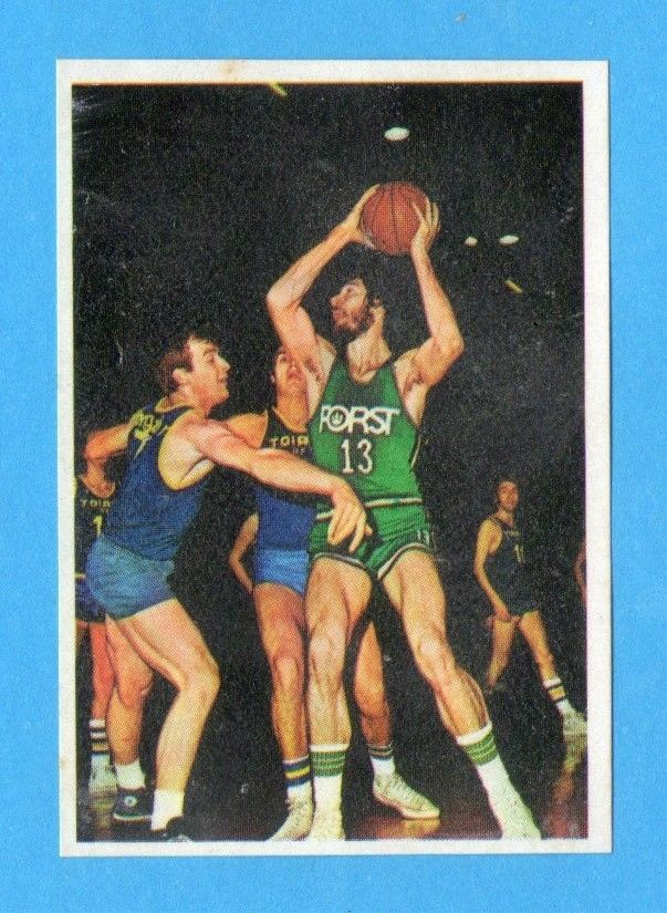 EDIS CALCIATORI 1975/76-Figurina n.354- LIENHARD - BASKET -Rec